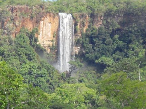 Cachoeira Agua Branca